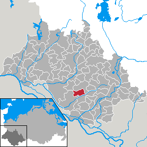 Leussow in Mecklenburg-Vorpommern - district Ludwigslust